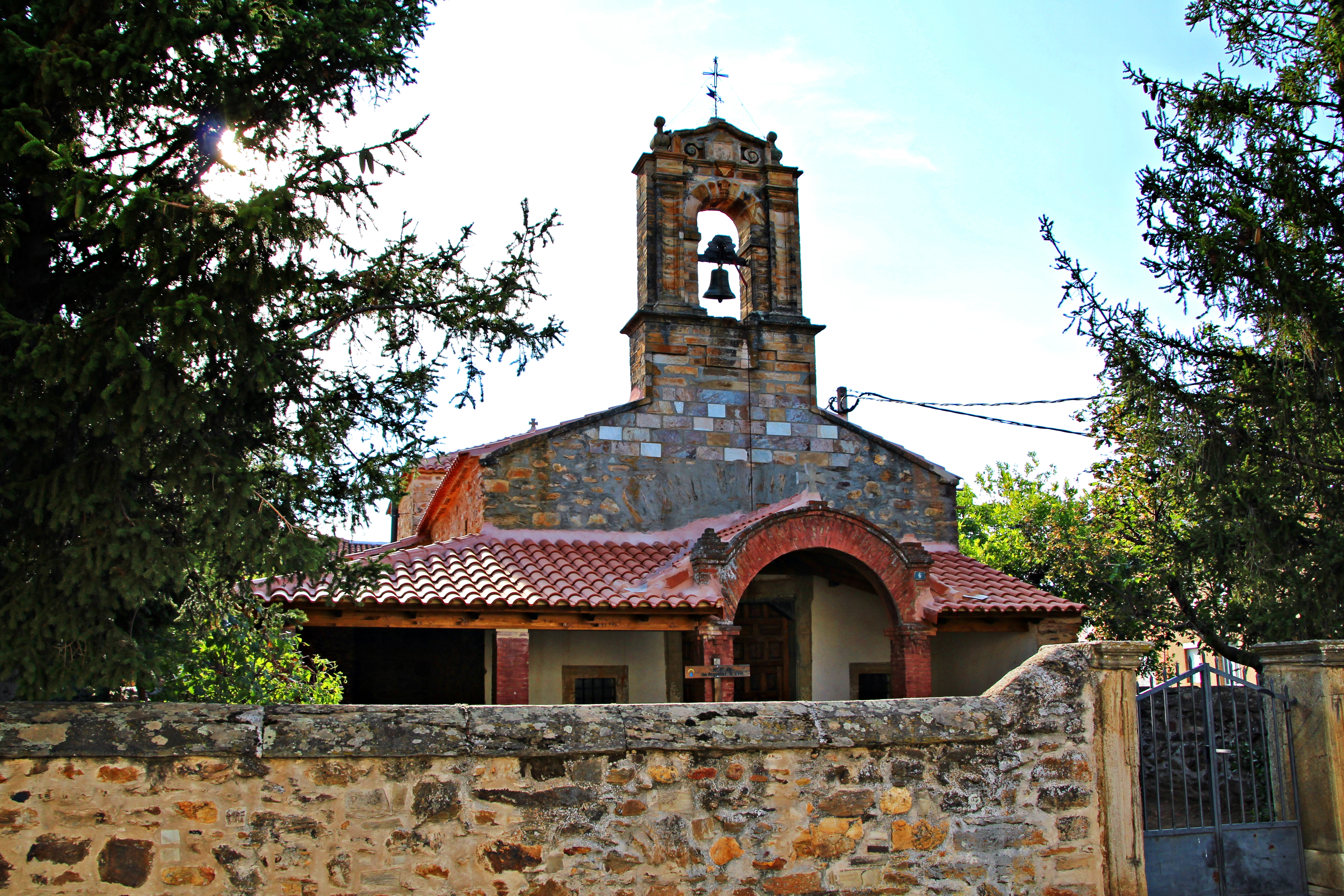 Tabuyo del Monte, La Maragatería, provincia de León.